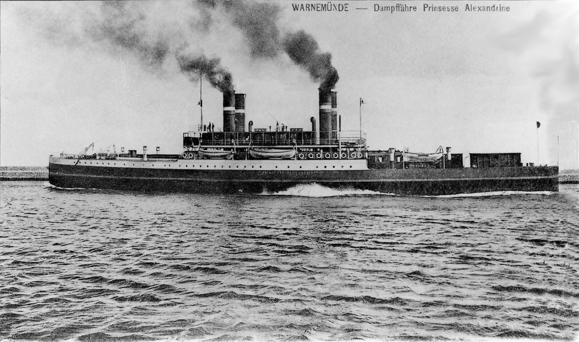 Eisenbahnfährschiff Prinsesse Alexandrine, Dampfschaufelrad-Antrieb, Baujahr 1903, dänische DSB-Reederei, Fährlinie Gedser-Warnemünde, verschrottet 1935